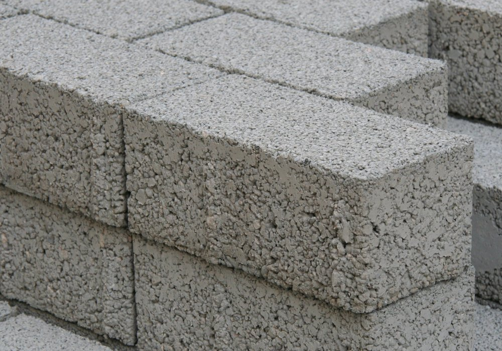 Aquadrainpflaster